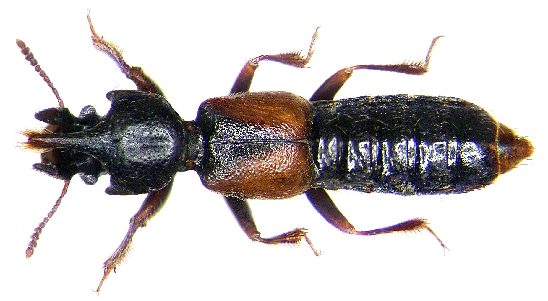 Familie: Staphylinidae Grösse: 6-8 mm Verbreitung: Europa Ökologie: auf Salzböden Fundort: Italien, Adria, Bibione leg.det. U.Schmidt, 1996 Foto: U.Schmidt, 2006